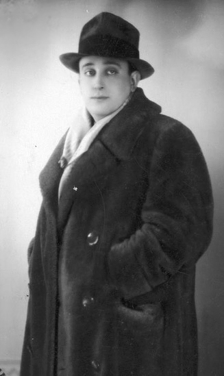 reżyser Michał Waszyński. Koncern Ilustrowany Kurier Codzienny